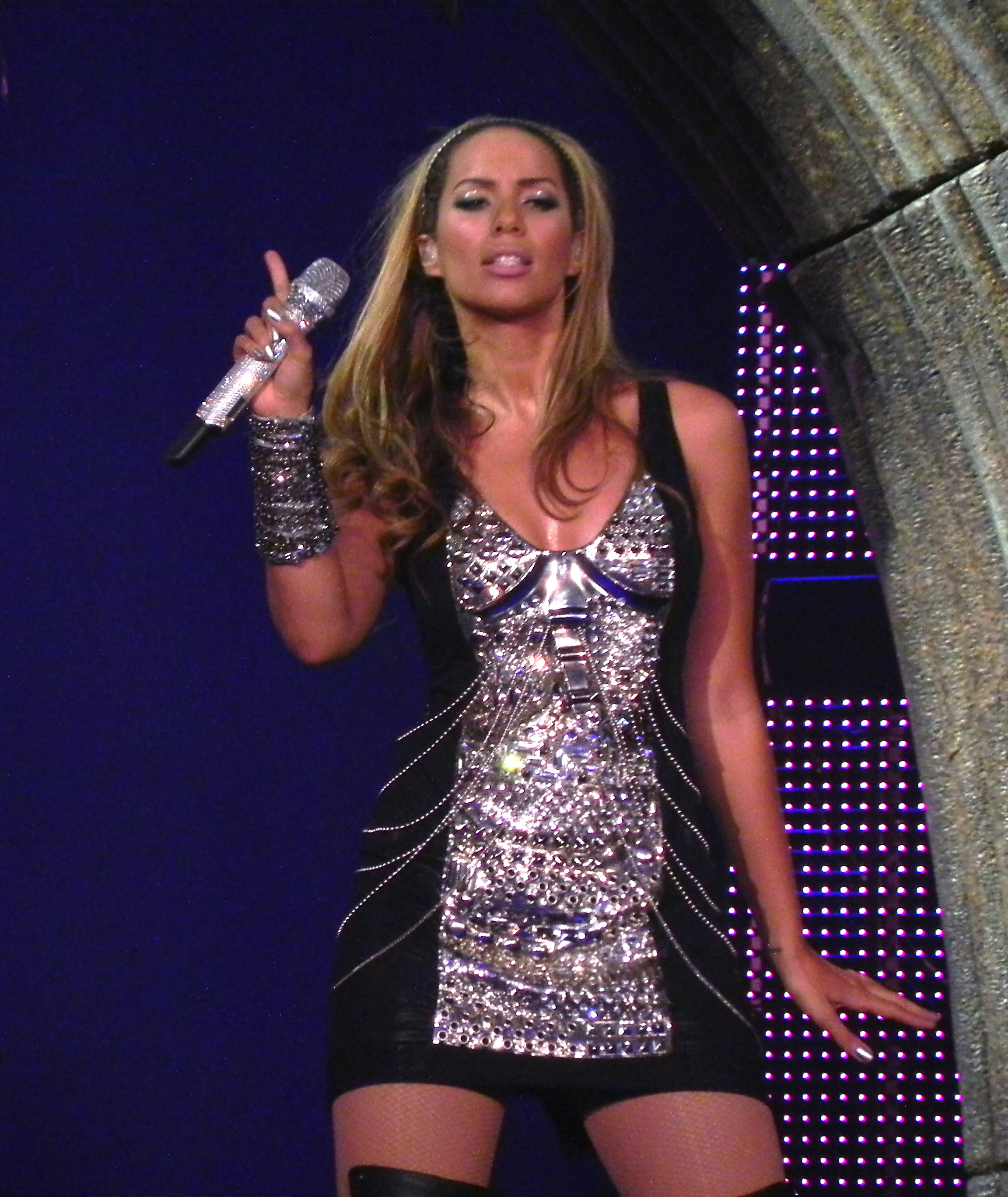 Leona Lewis durante a sua turnê "The Labyrinth" (em português: O Labirinto)